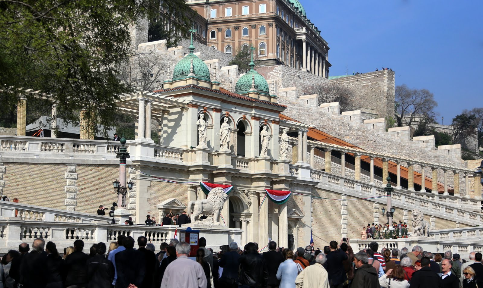 Várkert Bazár megnyitásakor, 2014.04.03.